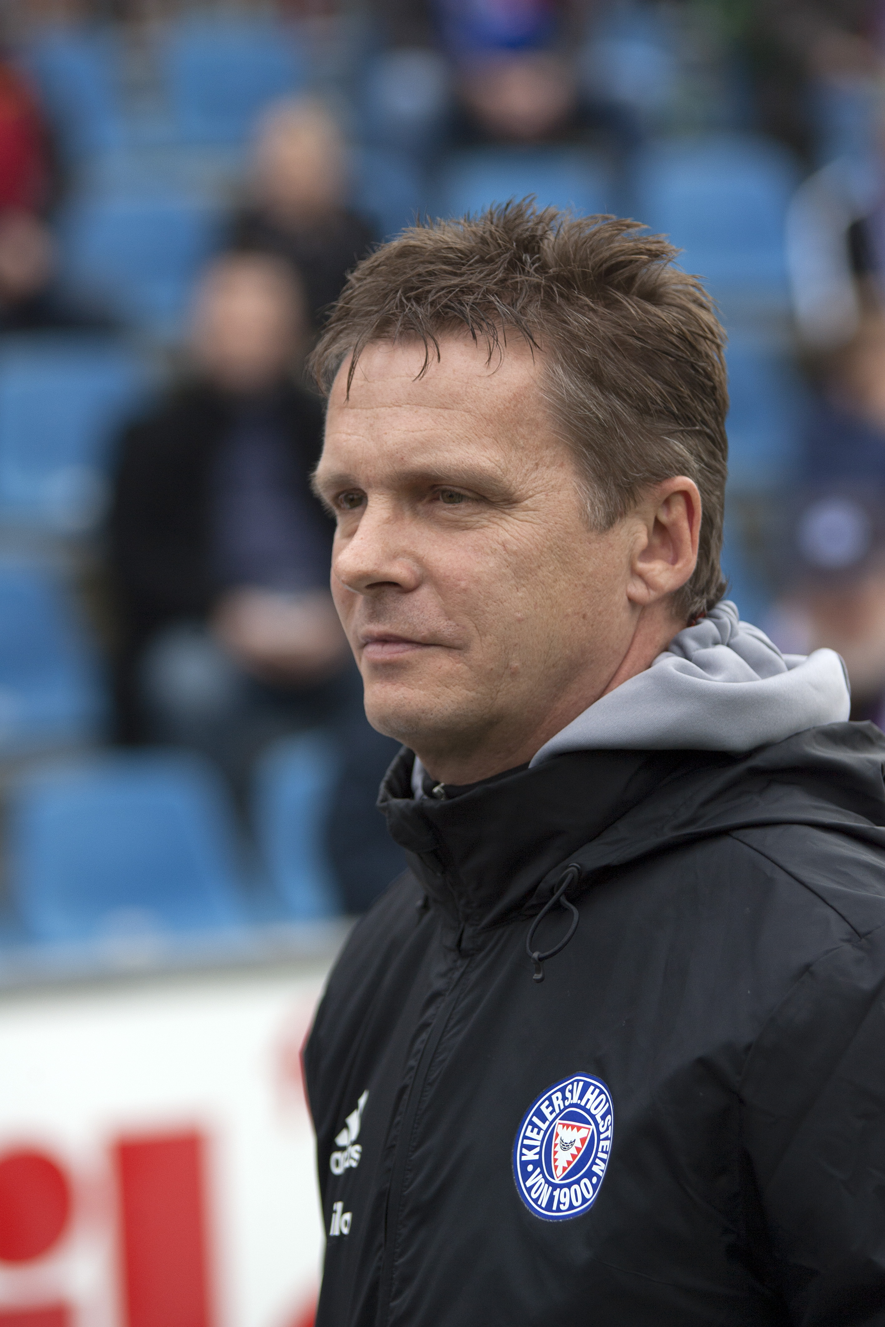 Karsten Neitzel (2015)